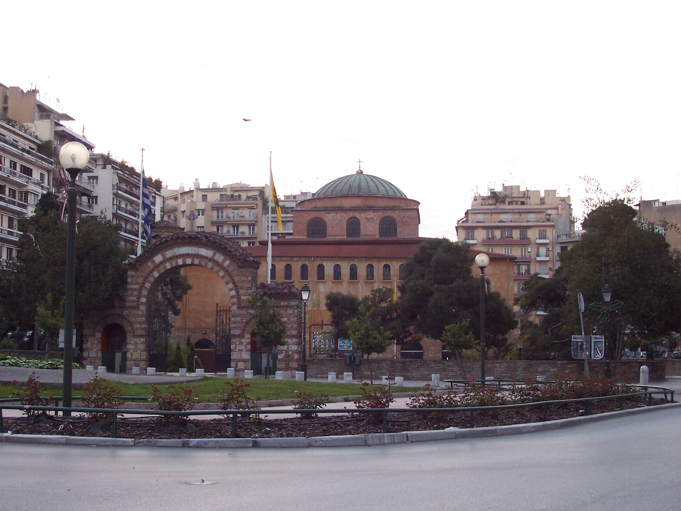 Hagia Sophia (Thessaloniki)